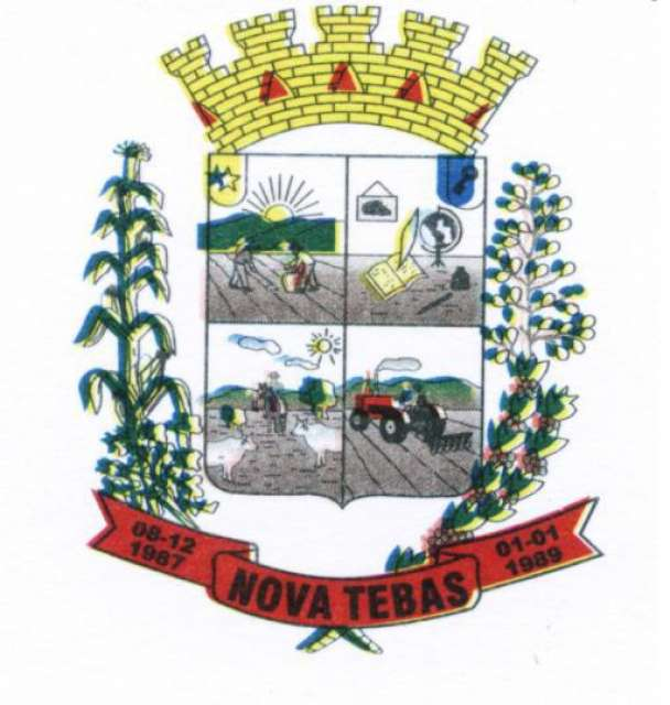 Brasao da Cidade de Nova Tebas